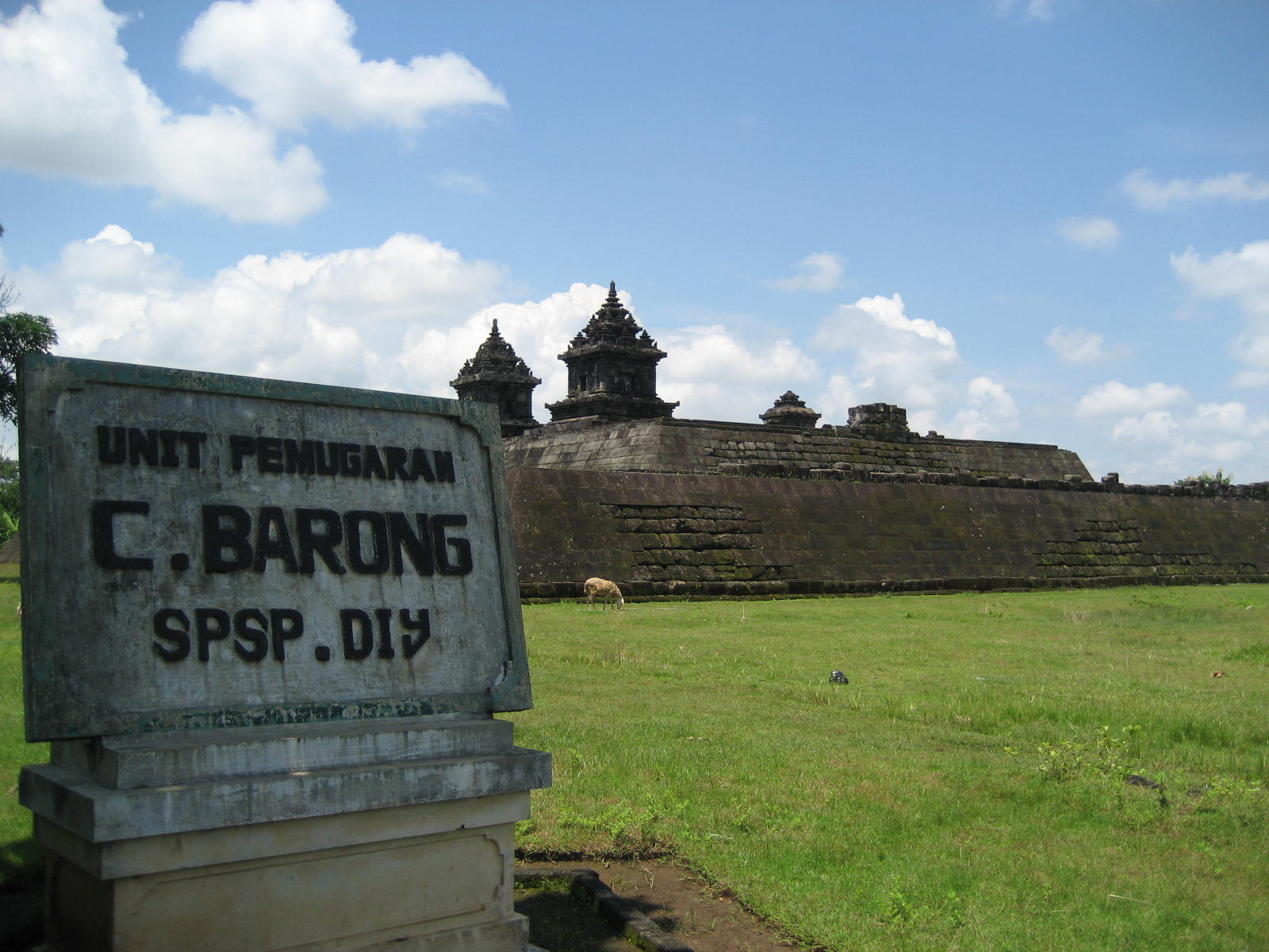 Candi Barong (Hindu's temple) IN CENTRAL jAVA, yOGYAKARTA